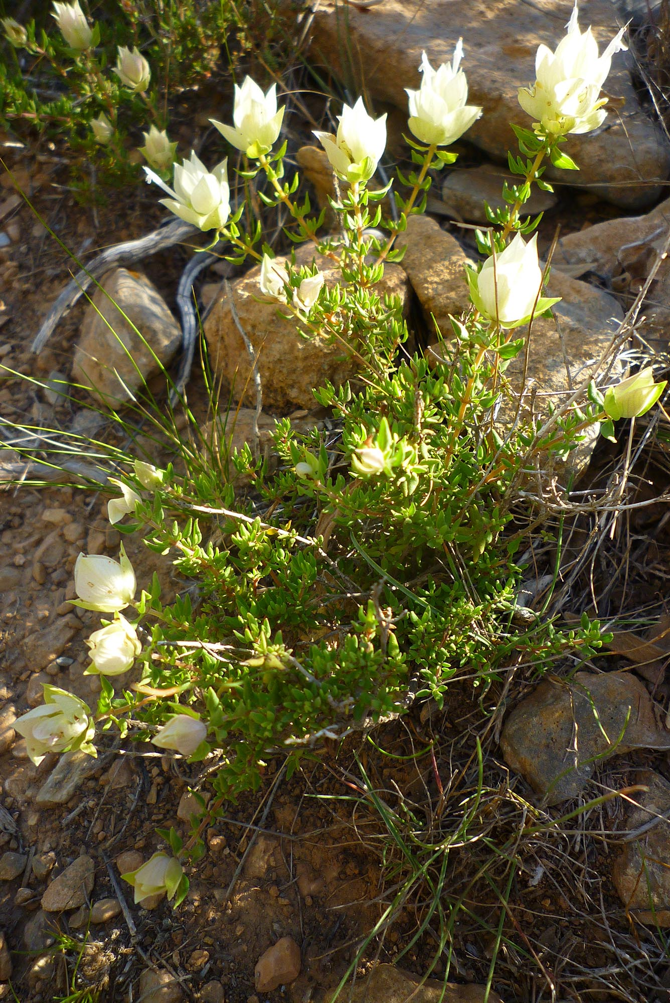 Thymus membranaceus en las sierras de Cartagena, España. Endemismo del sureste Ibérico.